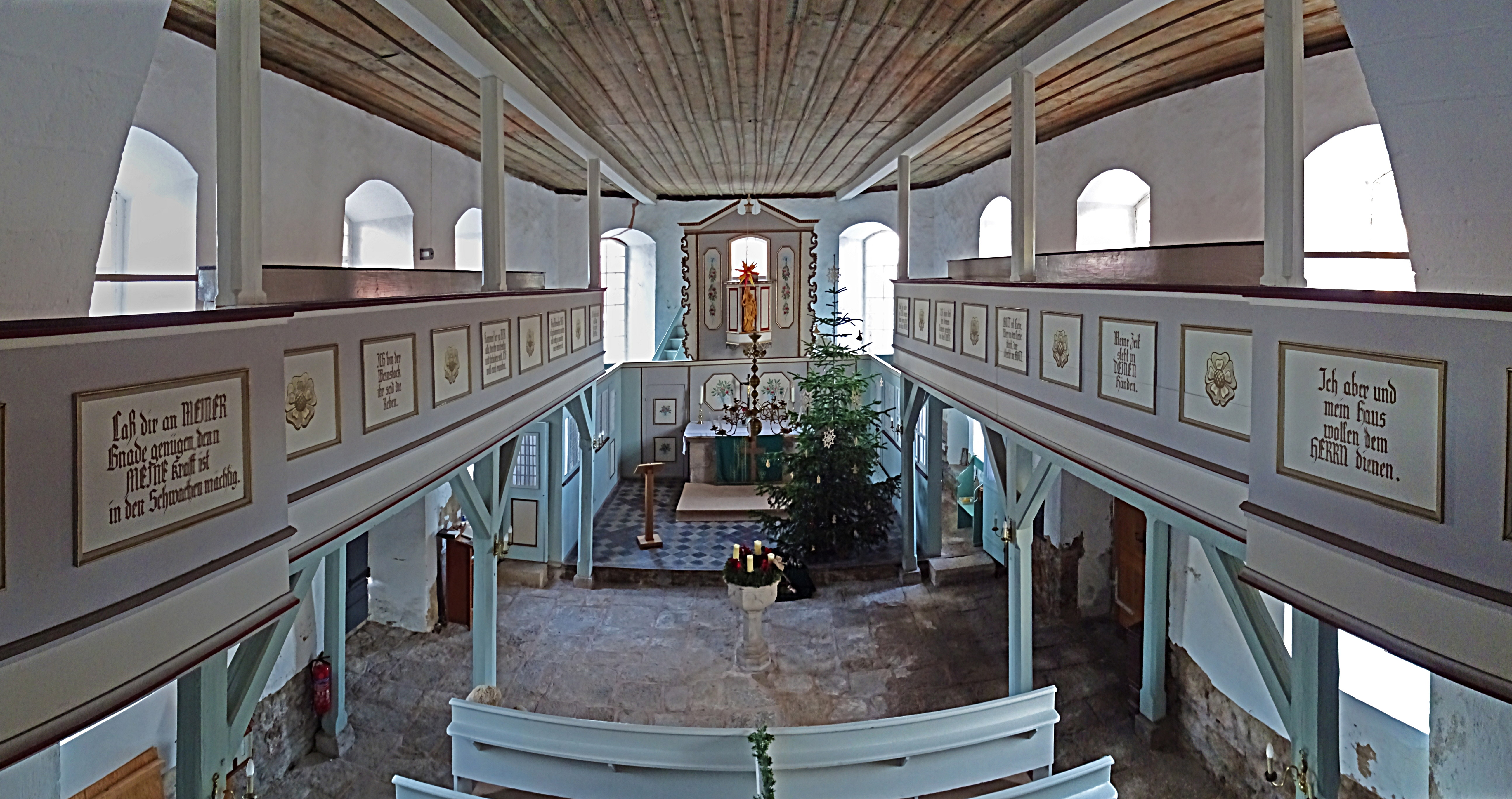 Blick von der Orgelempore in der Rosenkirche St. Marien (Elende)